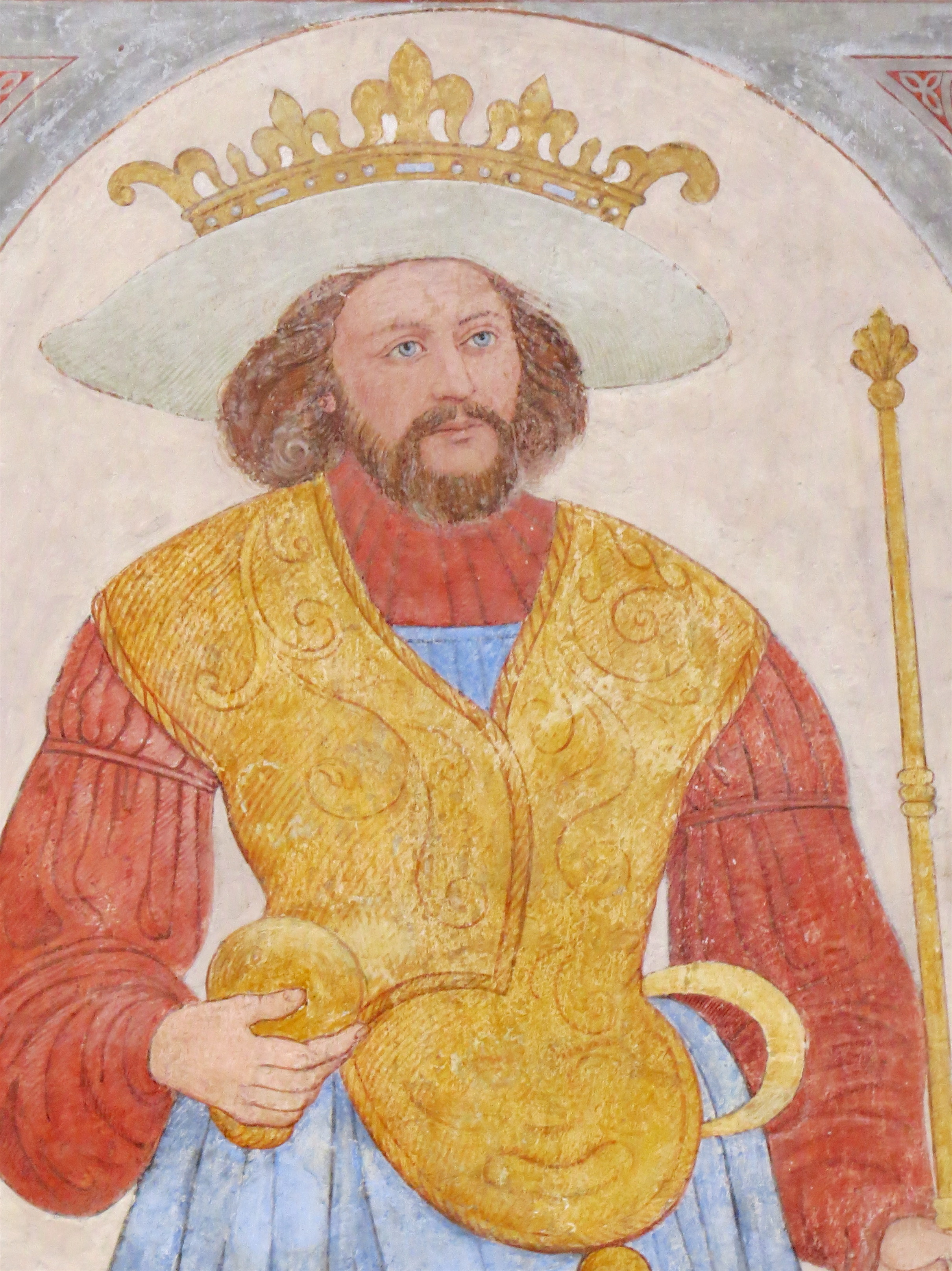 Harald Blåtand, kalkmaleri fra 1500-tallet i Roskilde Domkirke, Sjælland, Danmark